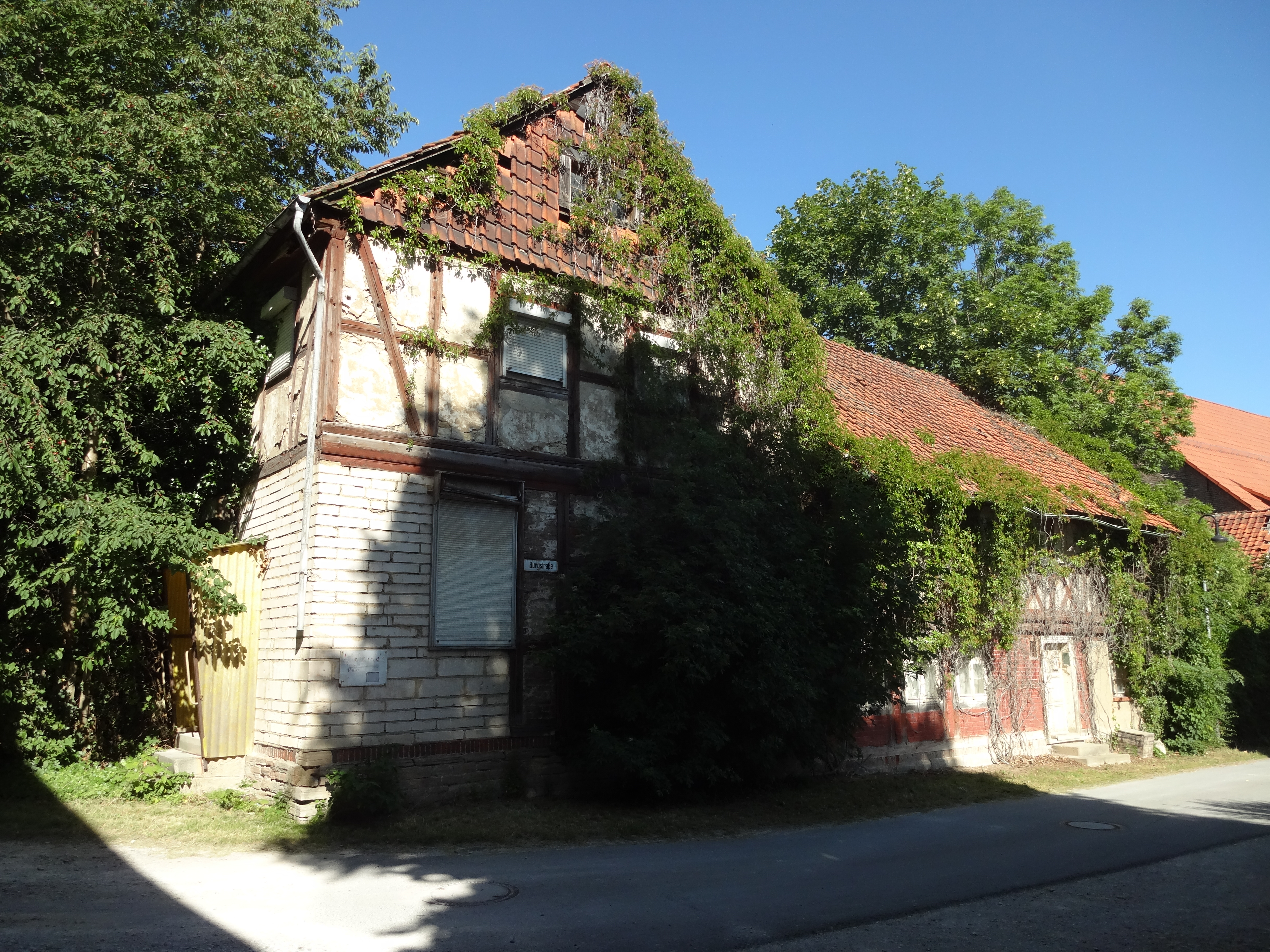 denkmalgeschützter Bauernhof (sogenannter Hennenhof) in der Burgstraße 5 in Langeln, Gemeinde Nordharz